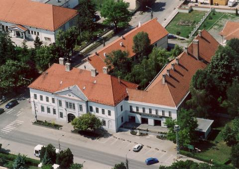 Szabadszállás, Hungary, aerialphotography